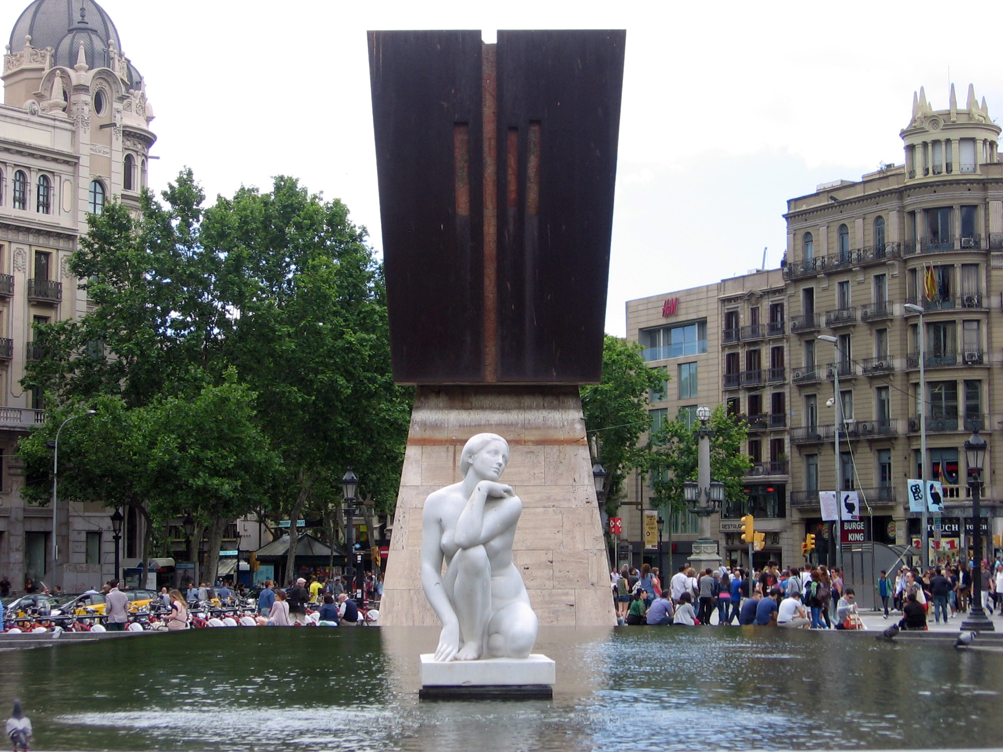 La diosa (Josep Clarà).